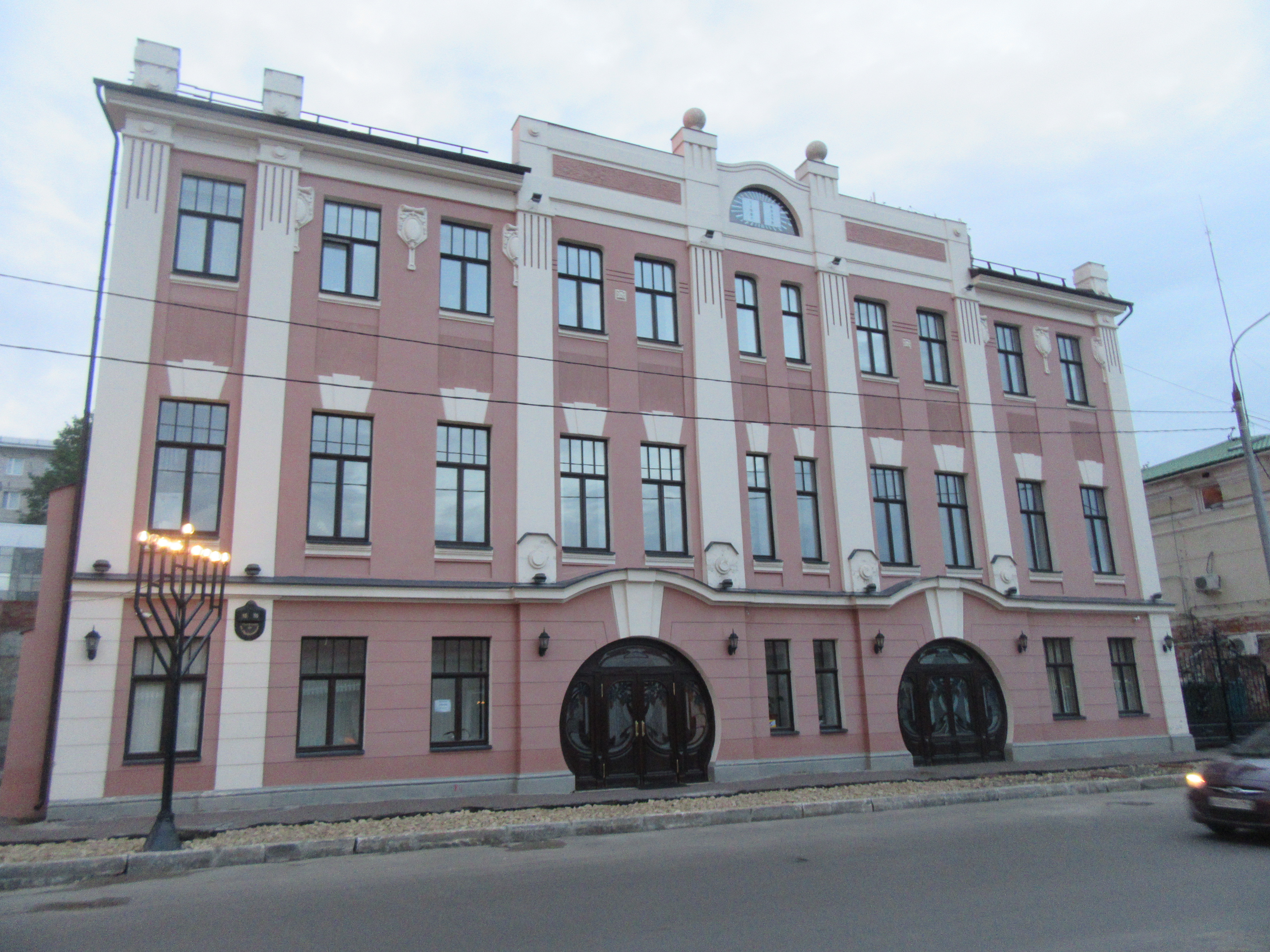 Façade rénovée de la synagogue de Kazan en Tatarstan (Russie)